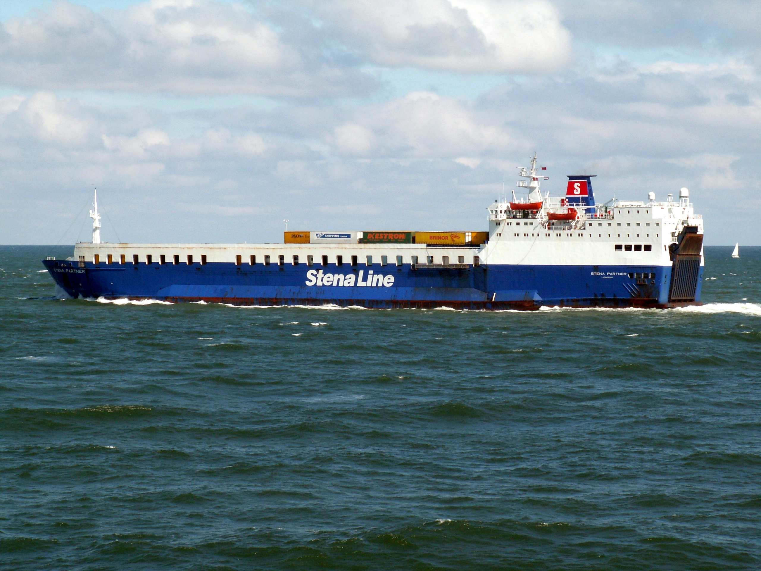 Stena Partner leaving Port of Rotterdam.